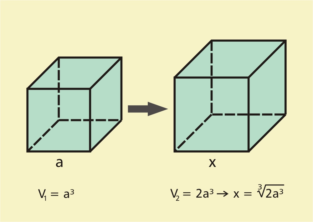 Kantenlänge eines Würfels bei Verdopplung seines Volumens